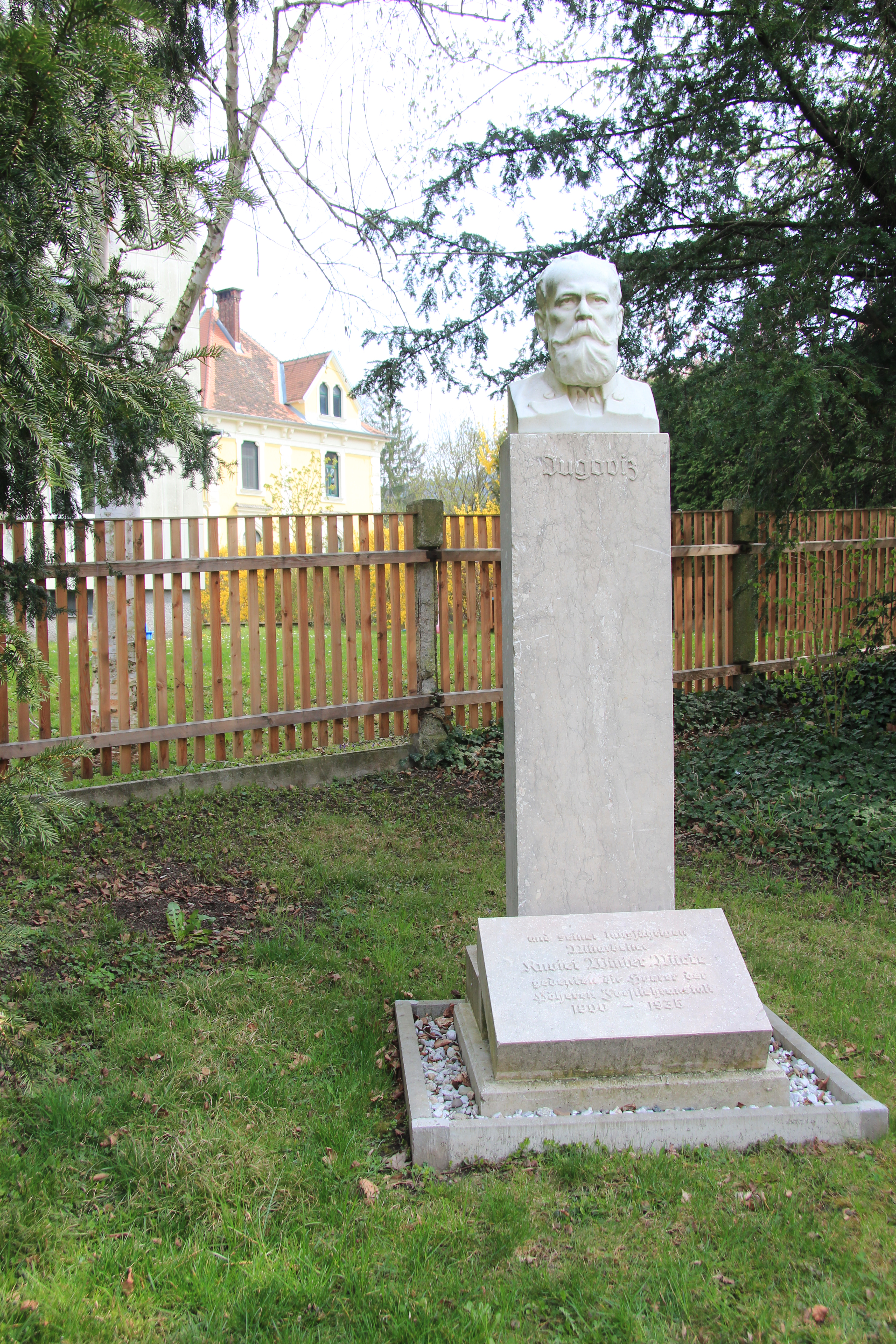 HBLA Forstwirtschaft Bruck an der Mur, Steiermark. Denkmal für Rudolf Jugoviz (1868-1932), Forstmann und Lehrer an der Schule.